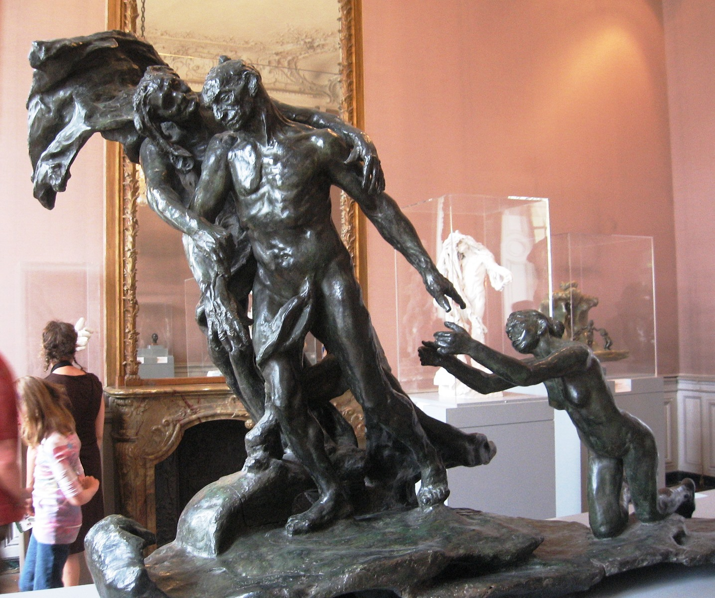 Rodin et Musee d'Orsay 36